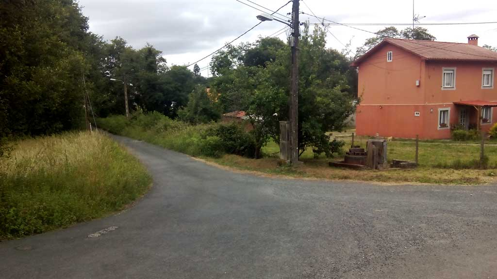 Vista da Vacariza.